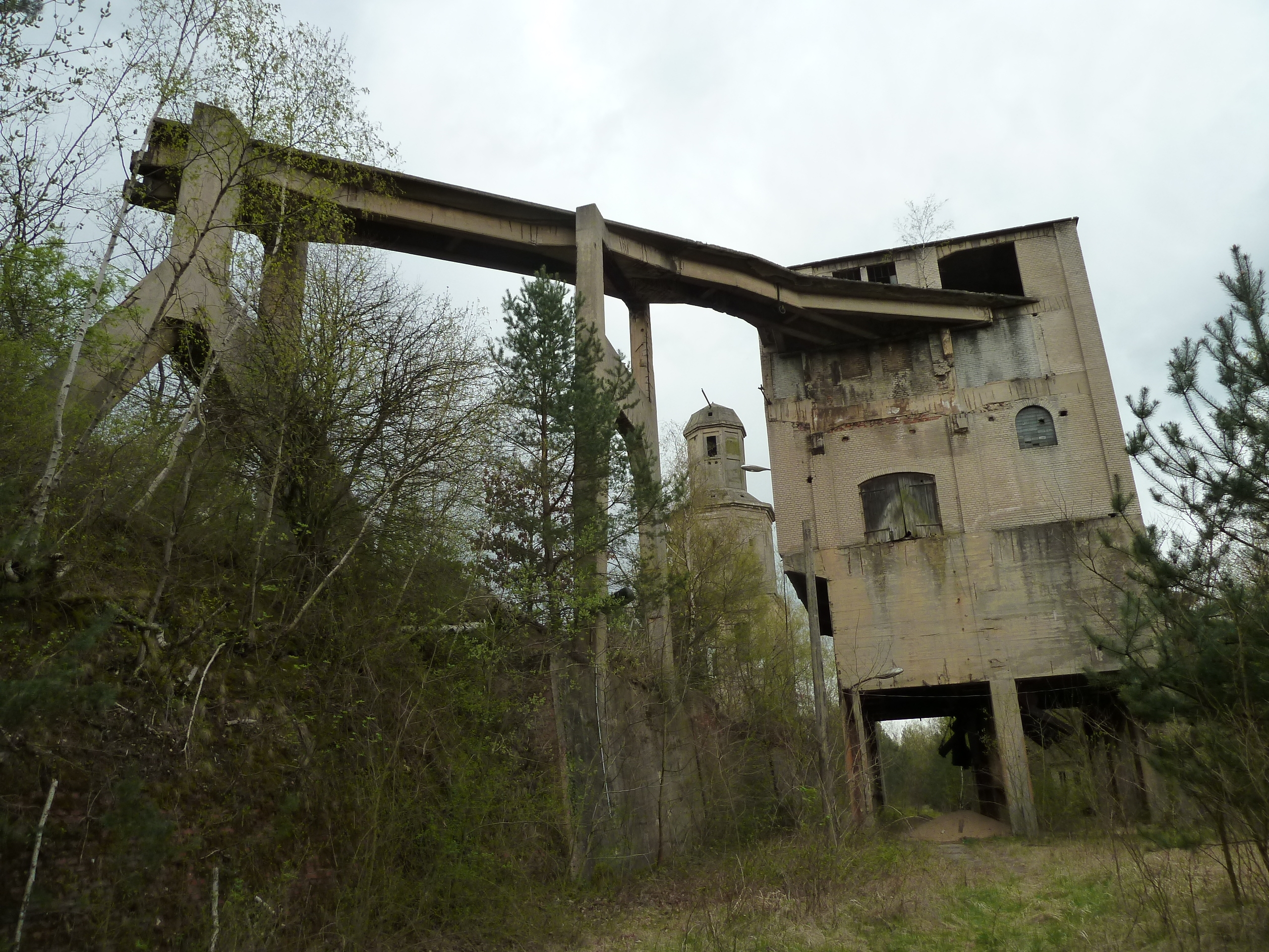 Seilbahnbrücke und Gleisreste in Kahla